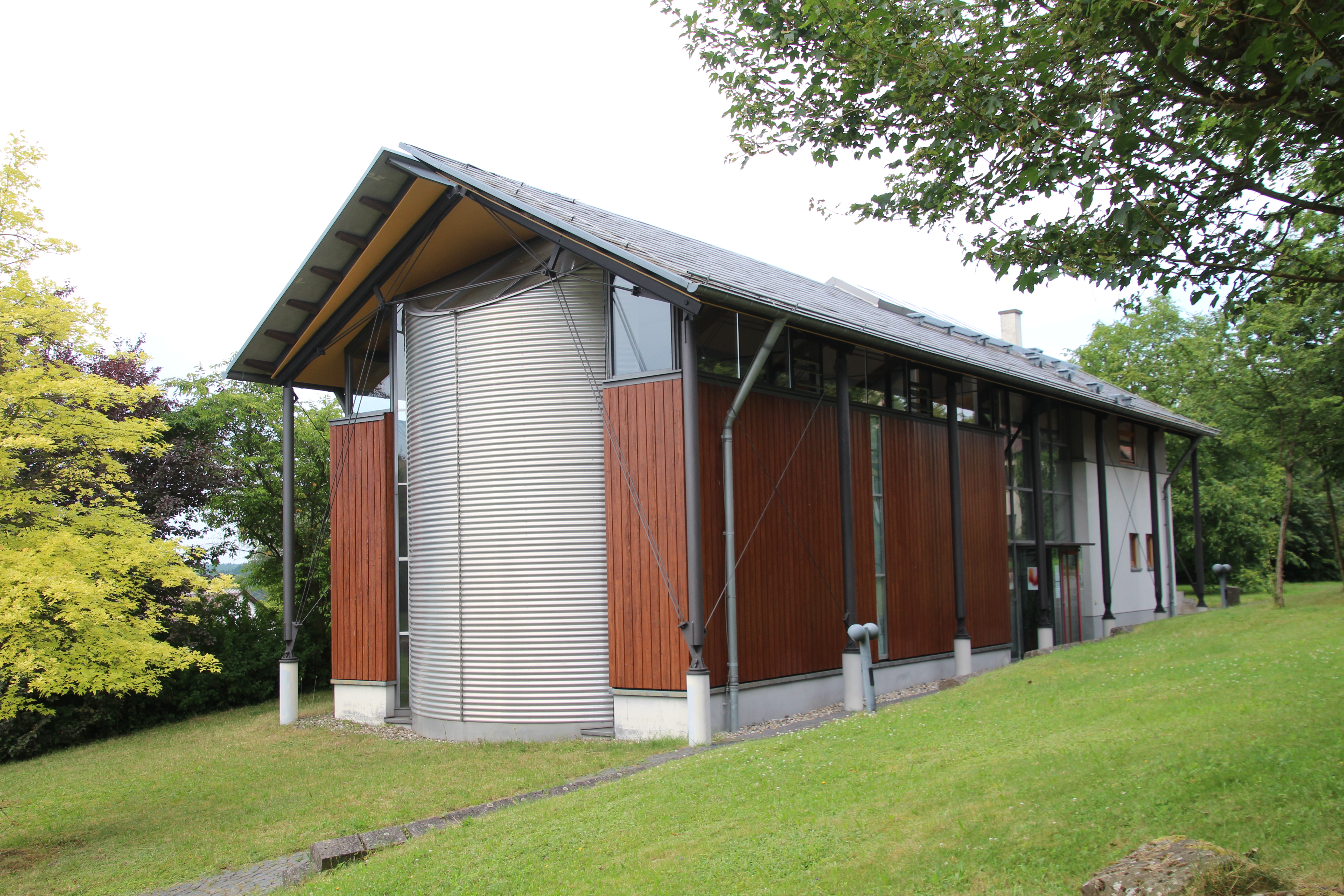 Evangelische Kirche Vetzberg